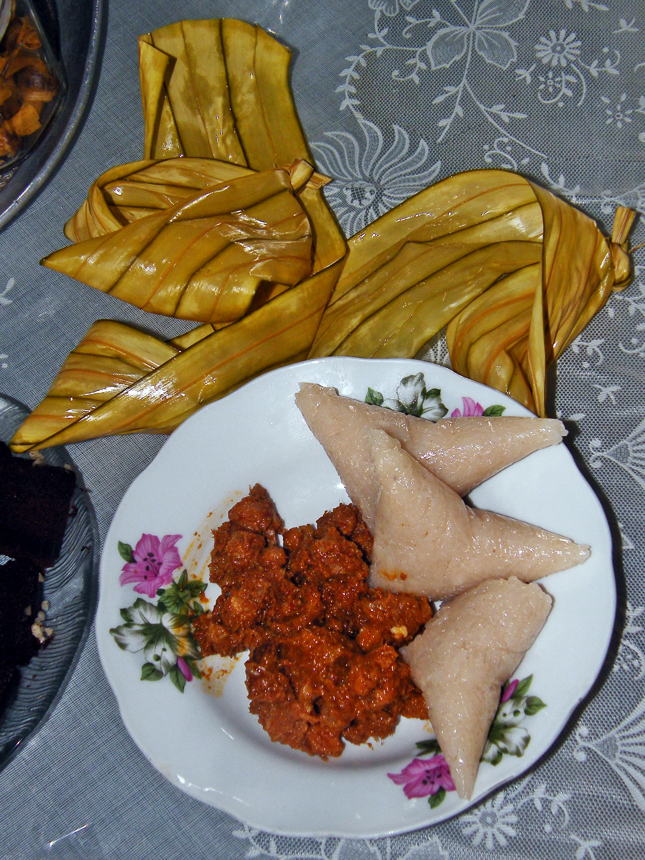 Ketupat palas with rendang daging